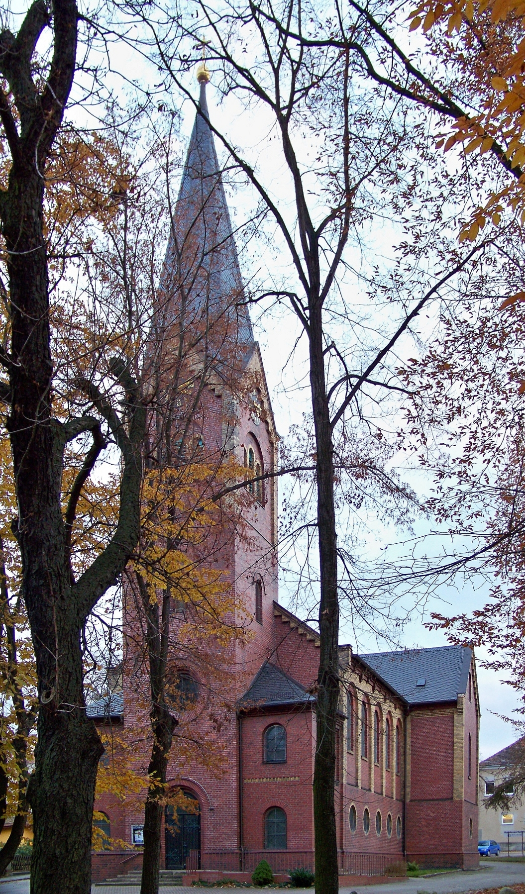 Evangelische Kirche in Weißwasser